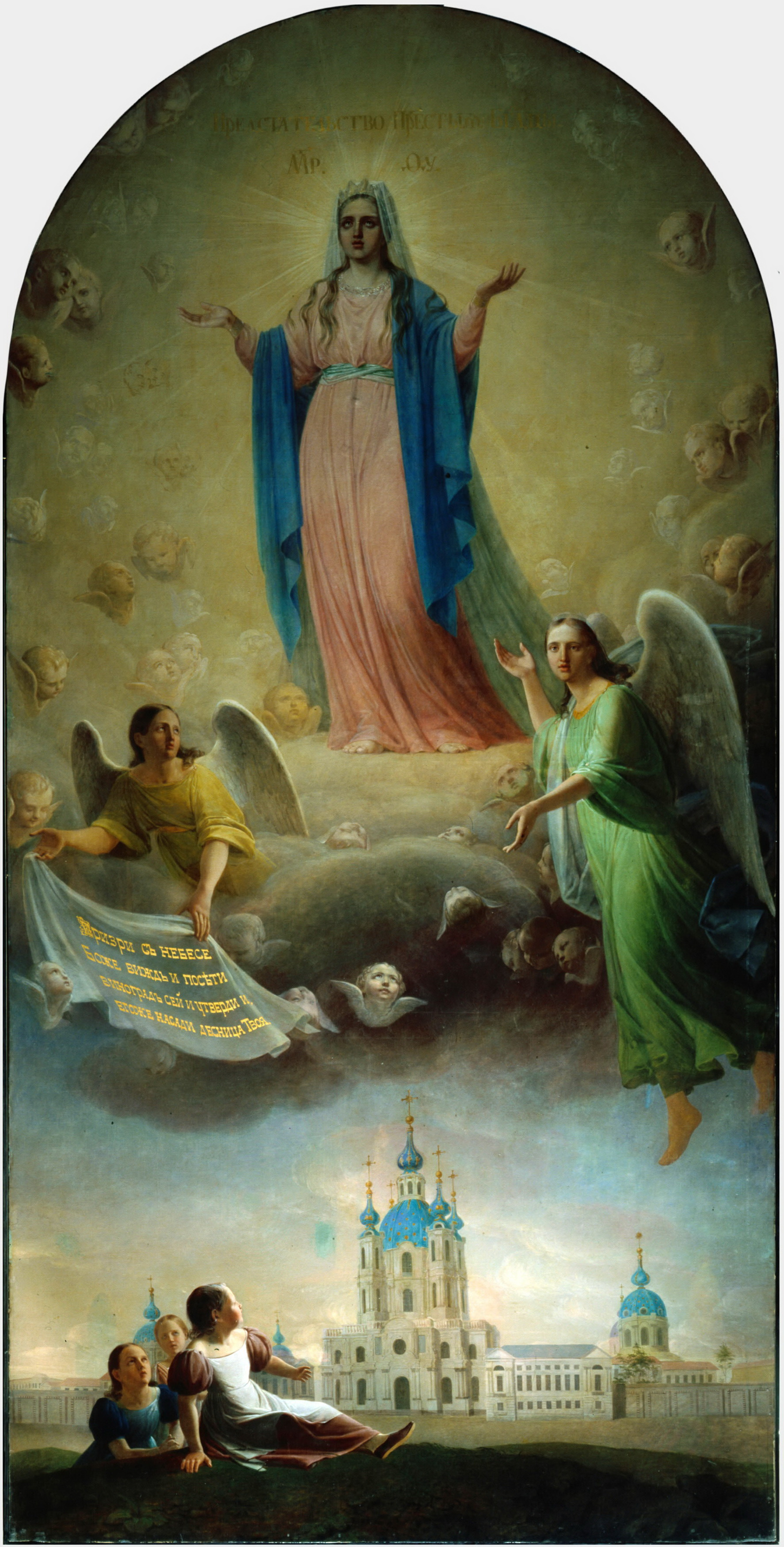 Запрестольный образ для придела Собора всех учебных заведений во имя Воскресения Христа Спасителя (Смольного собора) в Петербурге